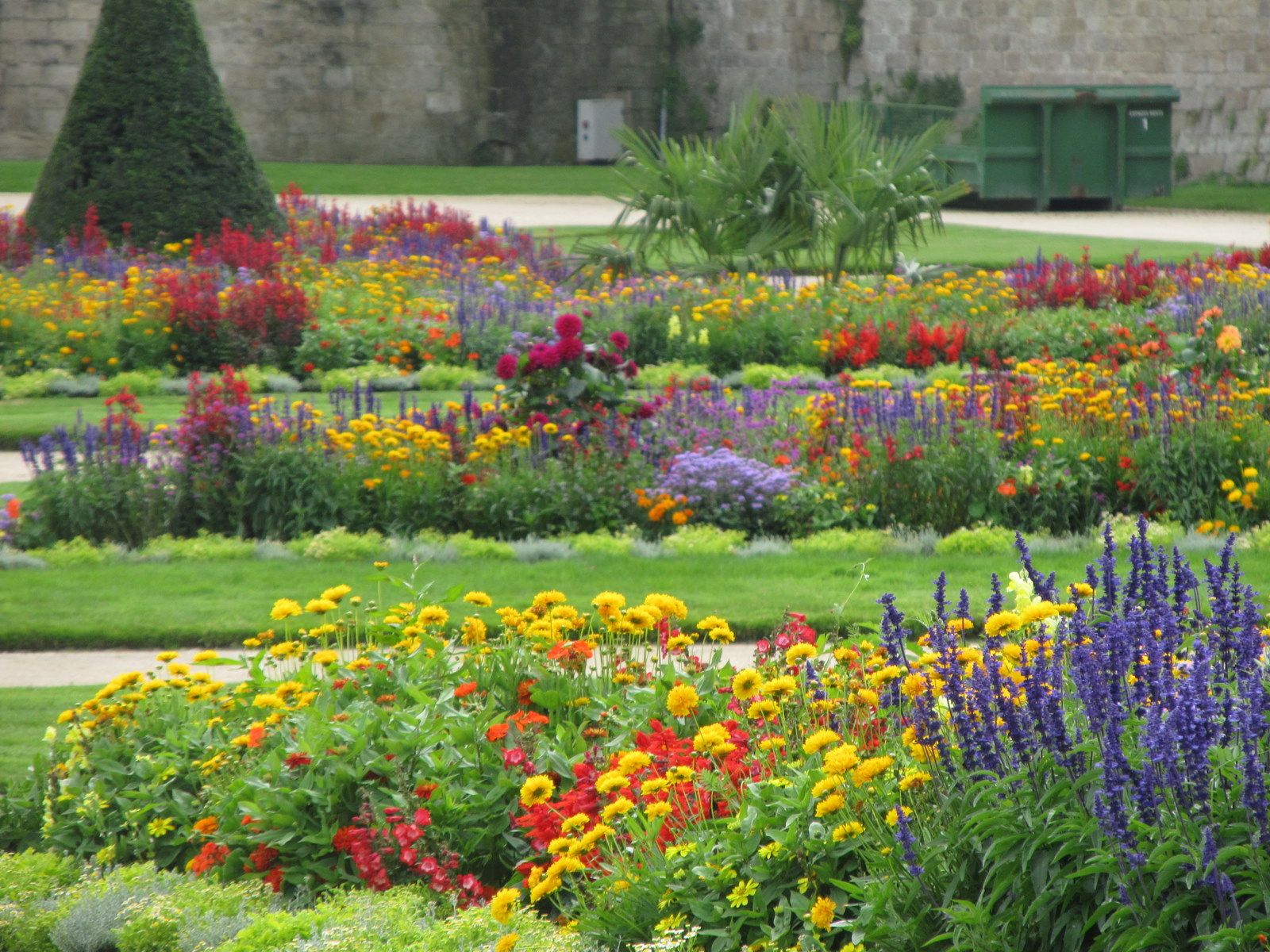 Vannes